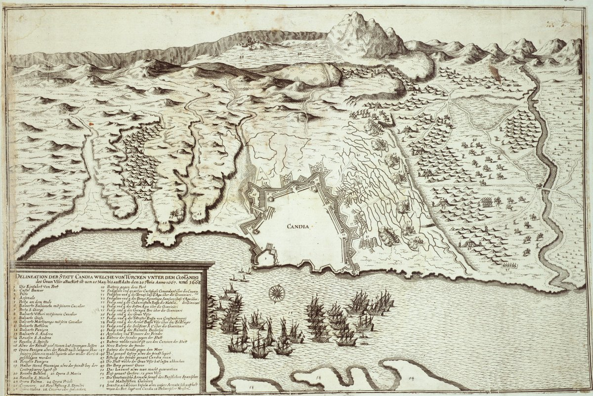 Delineation der Statt Candia, welche von Türcken unter dem Commando des Gran Visir attackirt von 25 May bis auf dato den 20 Septris Anno 1667 und 1668